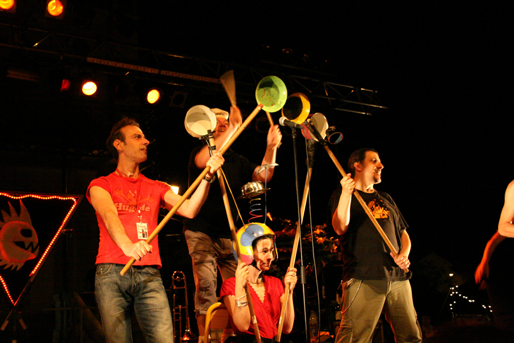 Raoul Petite, groupe de rock agricole sophistiqué, en concert le 28 avril 2007 à L'Isle-sur-la-Sorgue, Vaucluse, France